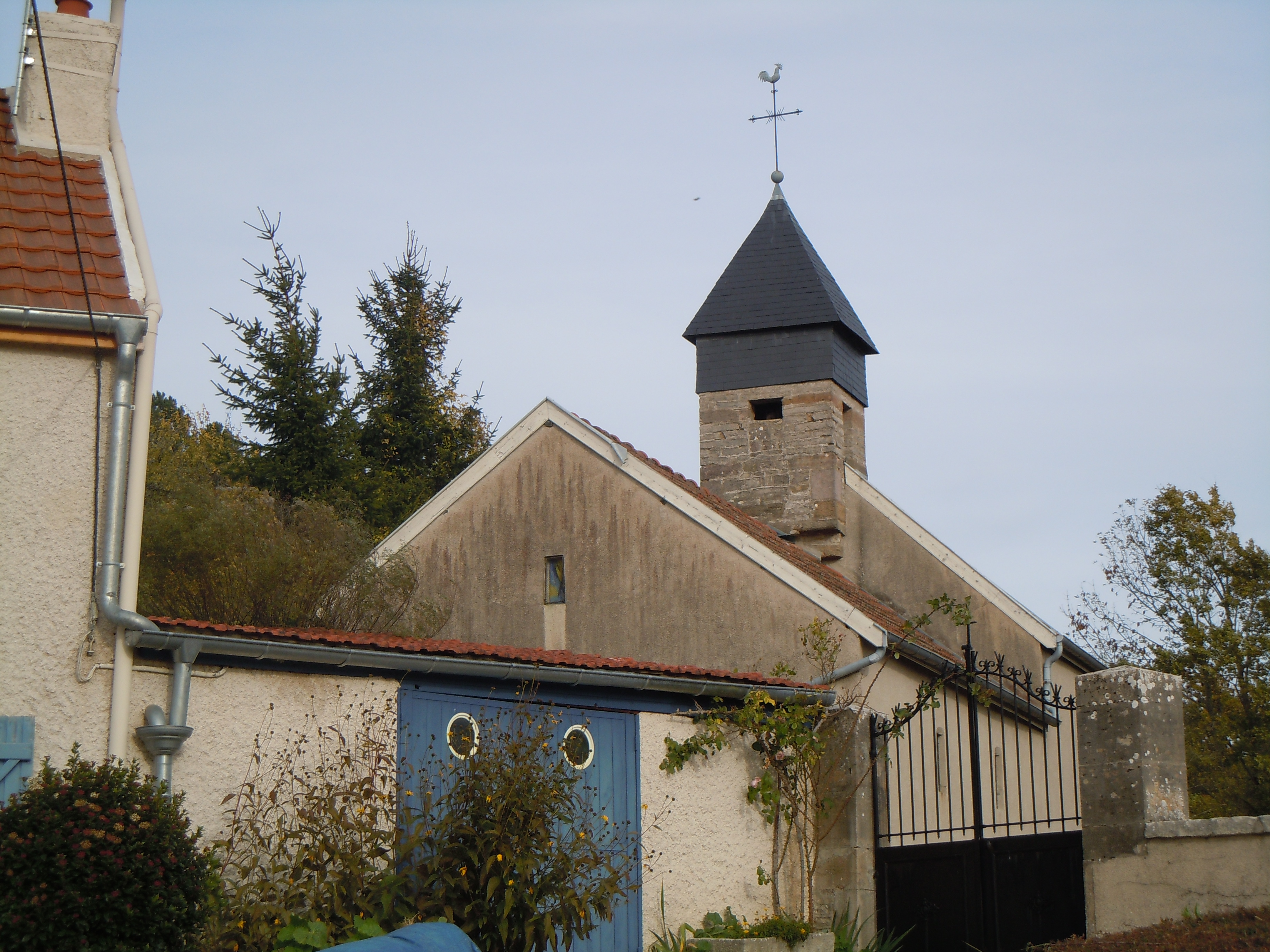 Eglise St Jean-Baptiste de Flavignerot